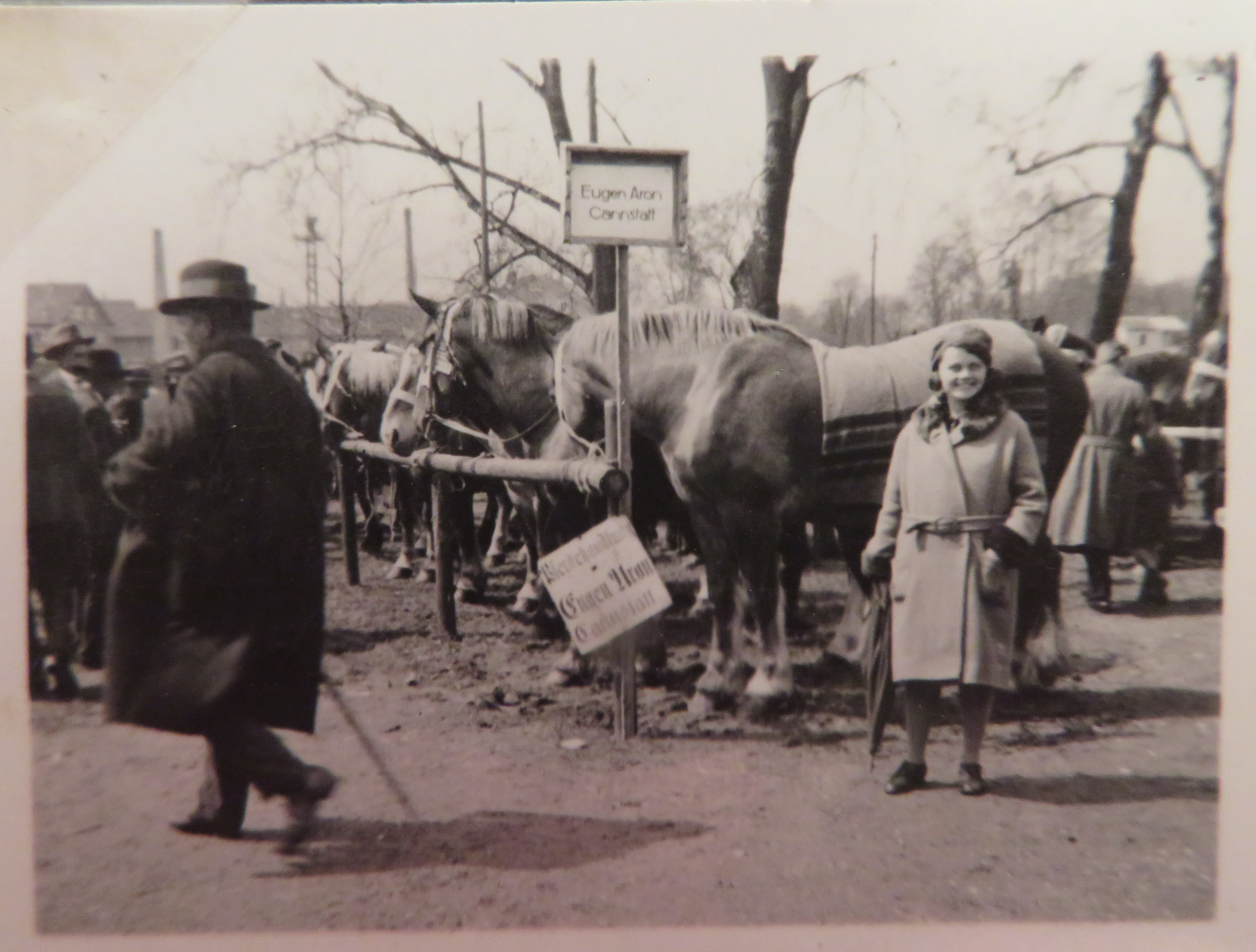 Viehhandlung Eugen Aron Cannstatt, vermutlich im Rahmen des Landwirtschaftlichen Hauptfestes 1924